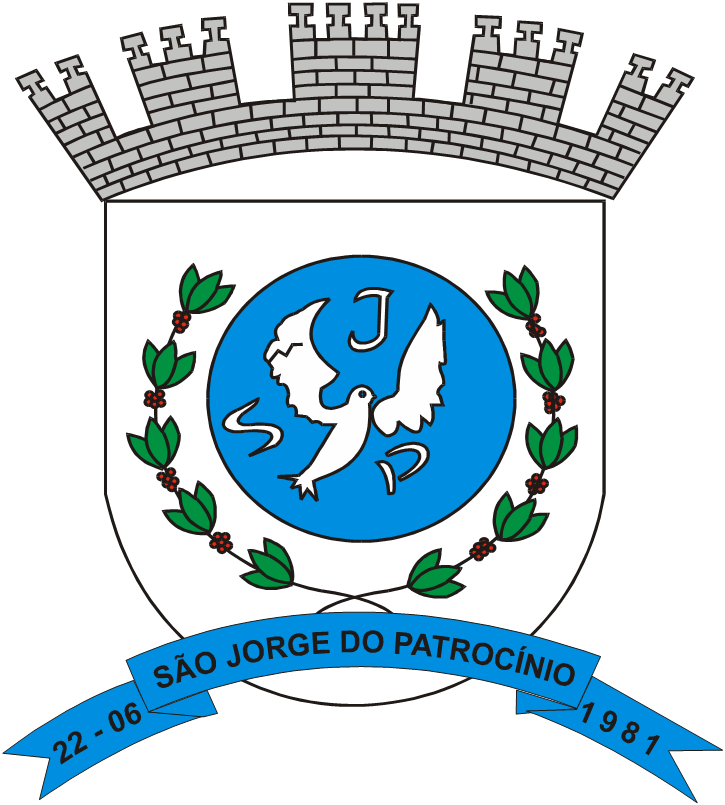 Brasão do Município de São Jorge do Patrocínio